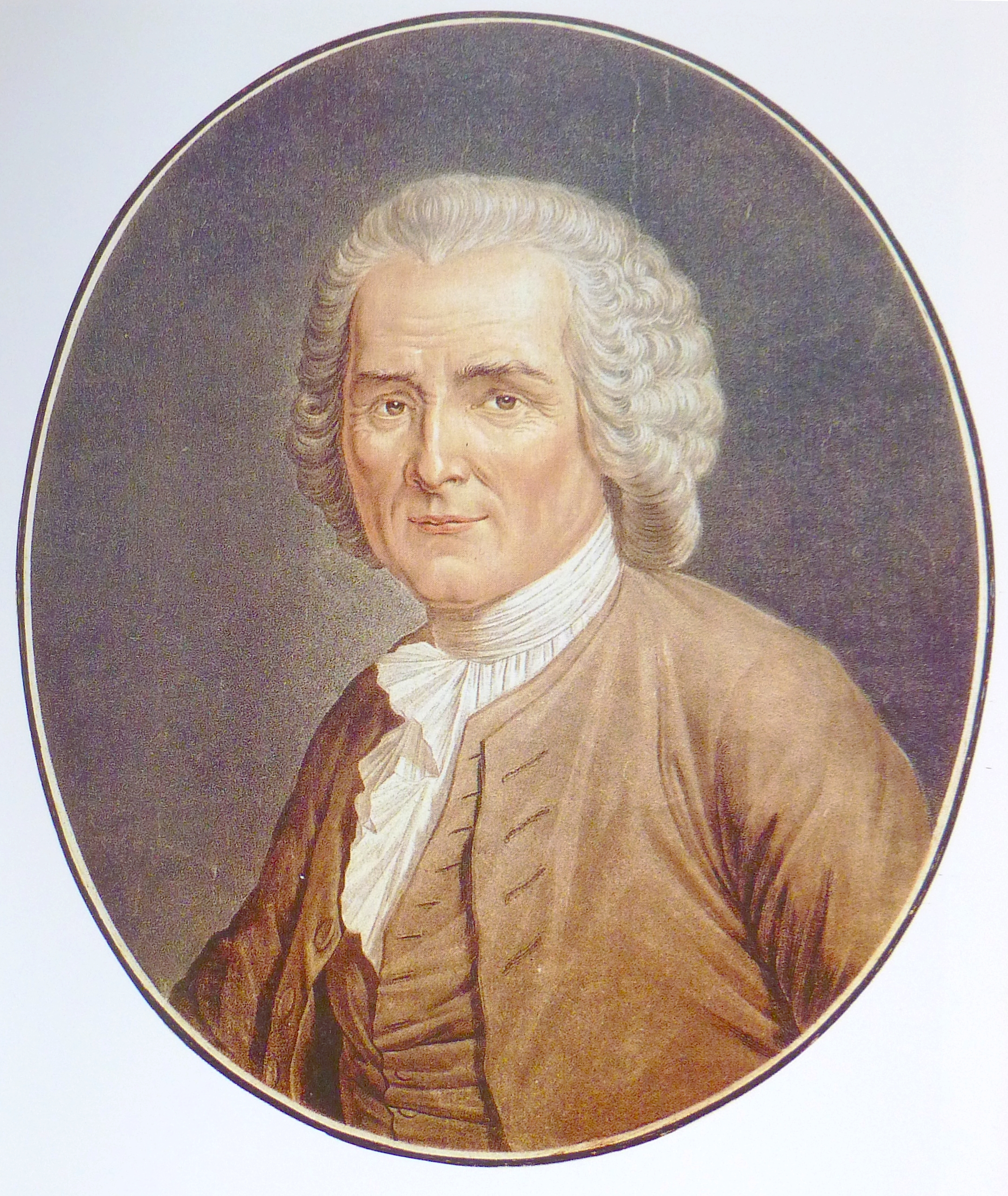 Portrait de Jean-Jacques Rousseau, par Angélique Briceau, 1791 - Bibliothèque de Genève. Publié dans Histoire de la littérature en Suisse romande, tome I, éditions Payot-Lausanne.